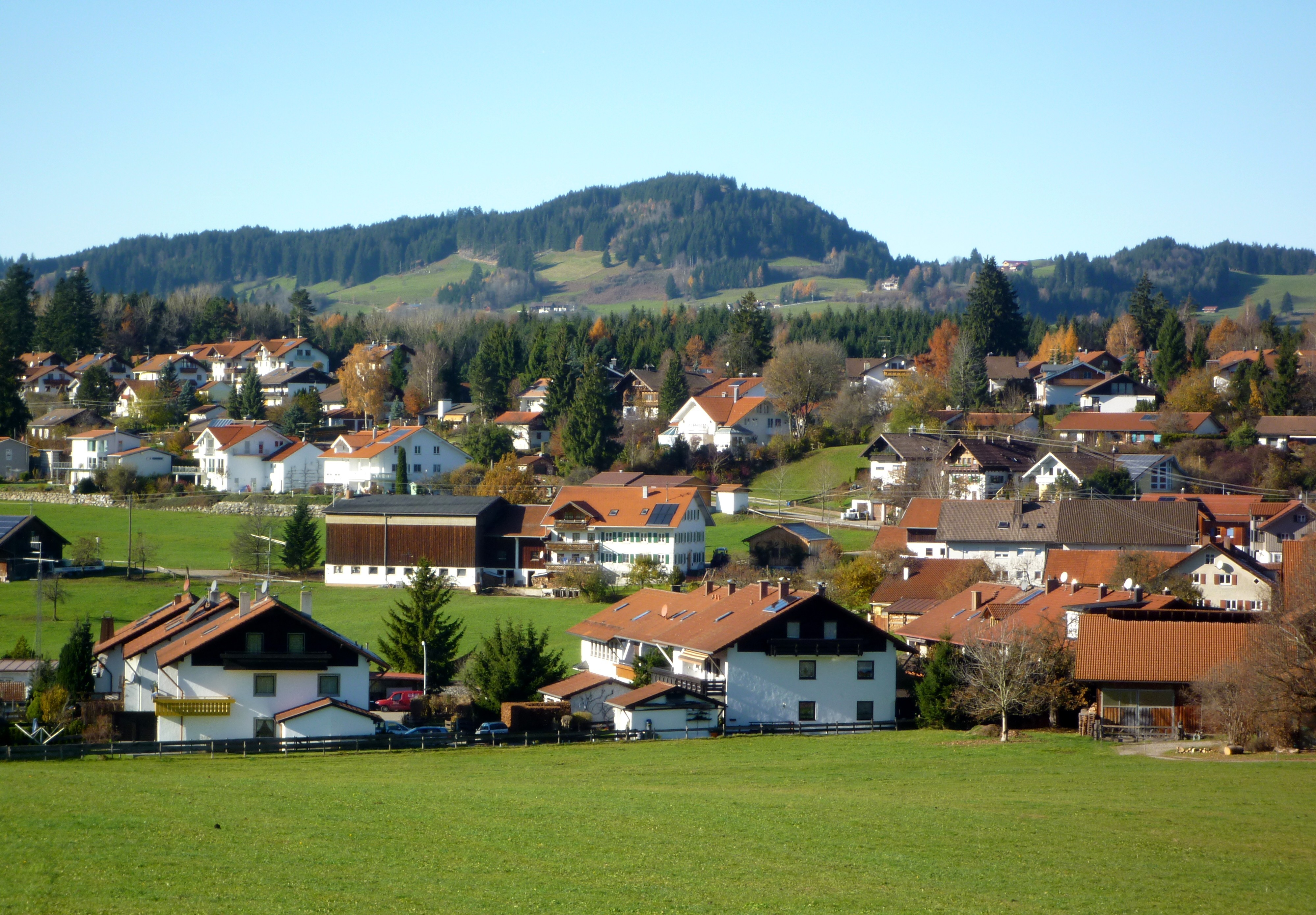 Waltenhofen - Oberdorf mit Stoffelberg